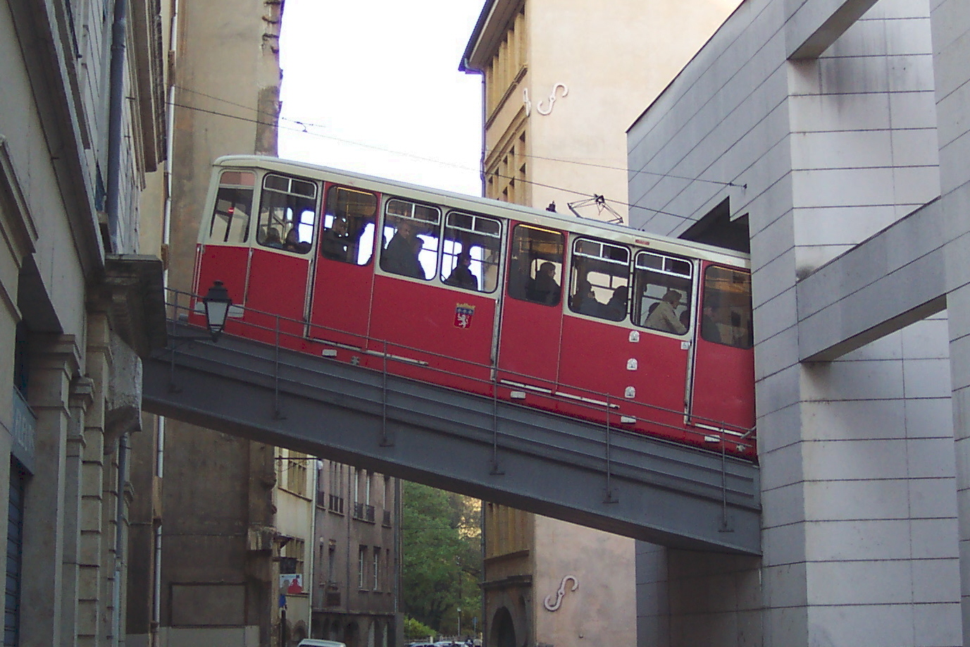 Ficelle de Lyon entrant dans la gare de St-Jean, venant de Fourvière.